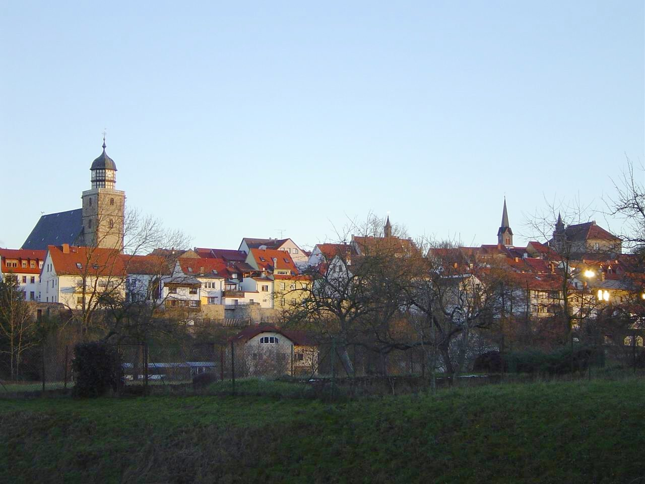 Ansicht der Innenstadt von Geisa im Wartburgkreis von Westen